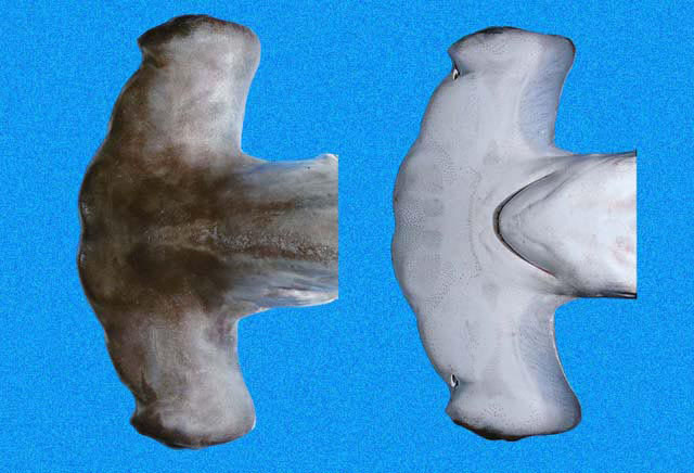 Sphyrna lewini